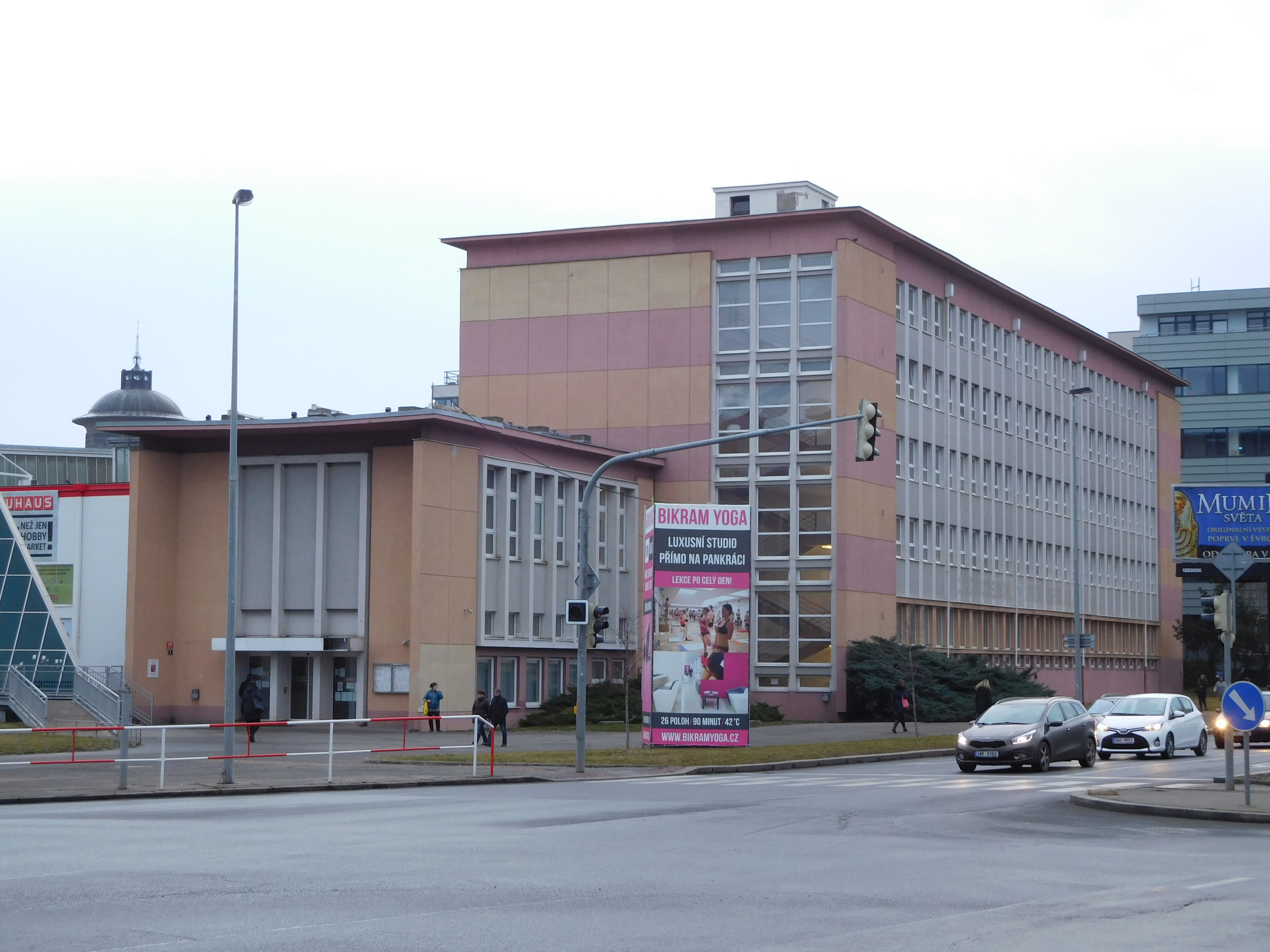 Praha - Michle, Budějovická 1 (Finanční úřad pro Prahu 4)